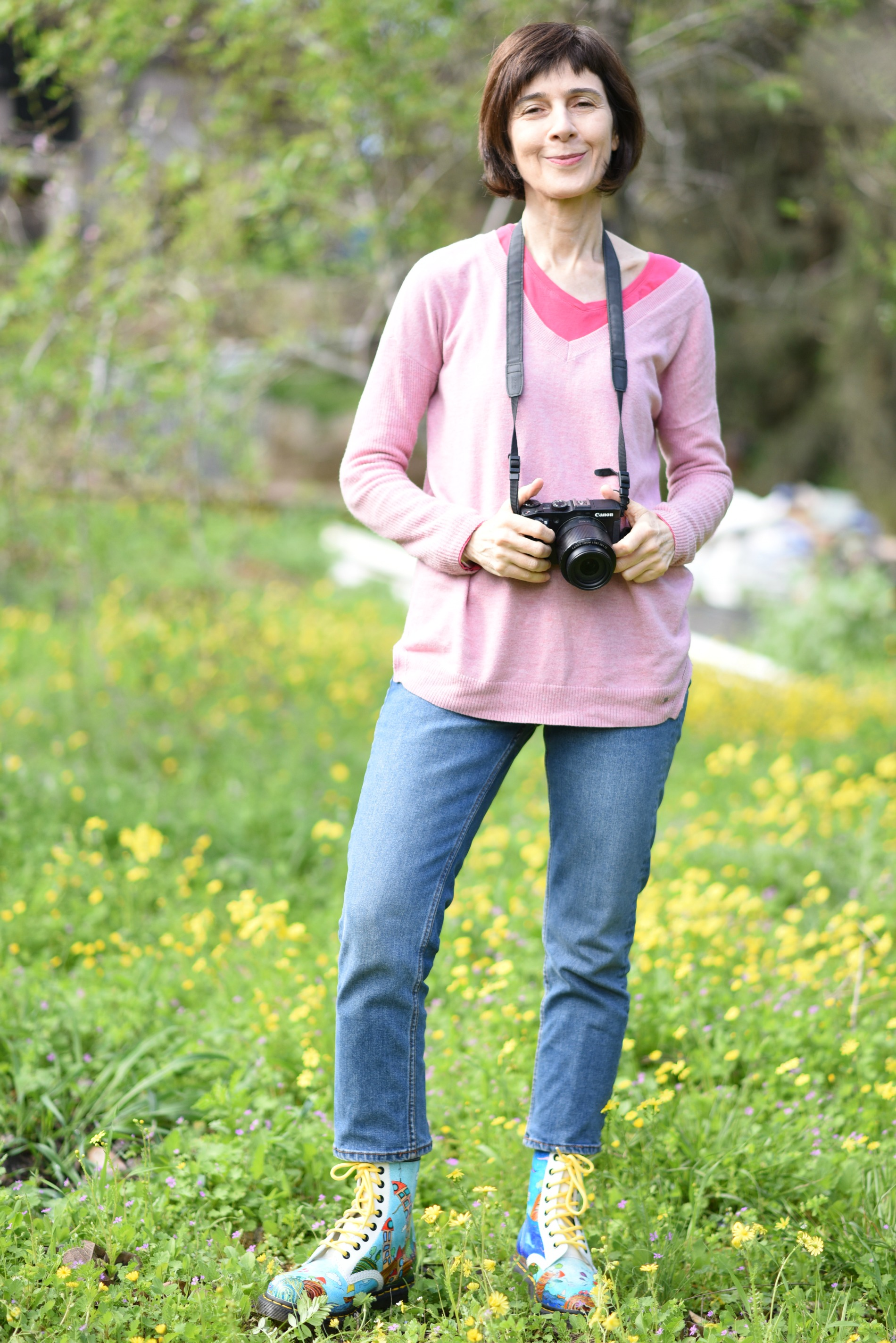 דבורית שרגל